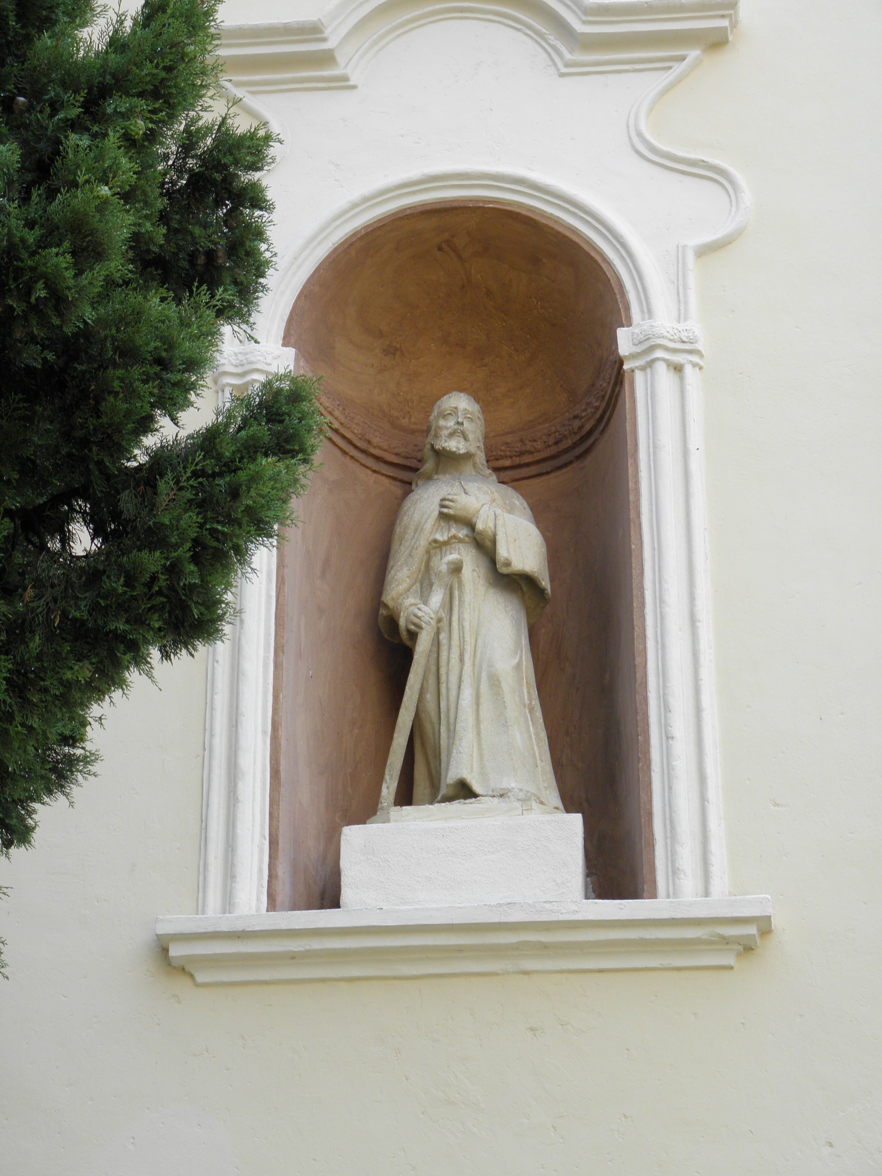 Cassone, frazione di Malcesine: la chiesa parrocchiale dei Santi Benigno e Caro, una delle due statue che ornano la facciata.